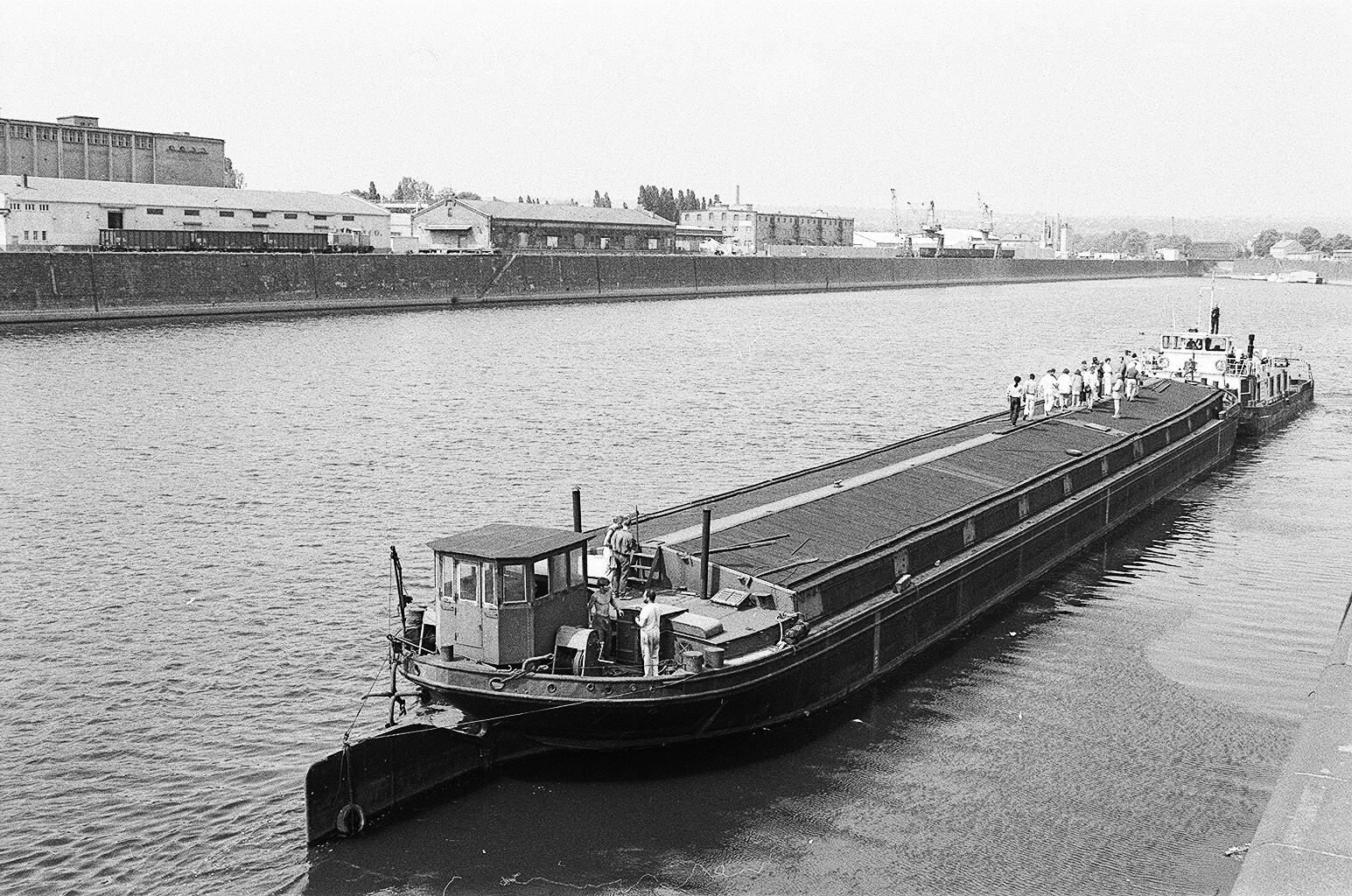 Lastkahn Ida im Alberthafen Dresden bei der Abfahrt nach Tangermünde für den Umbau zum Theaterkahn